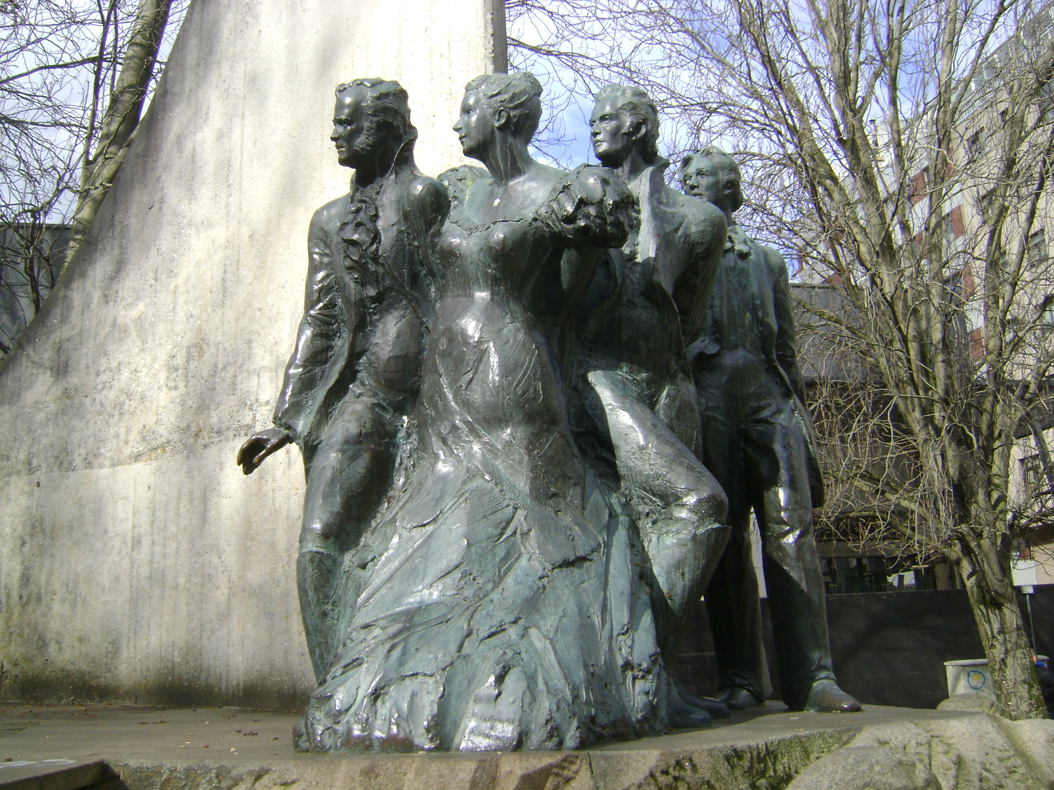 Estatua de liberales coruñeses el siglo XIX, La Coruña (España)